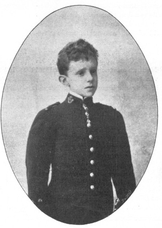 Alfons XIII. von Spanien im Alter von 14 Jahren